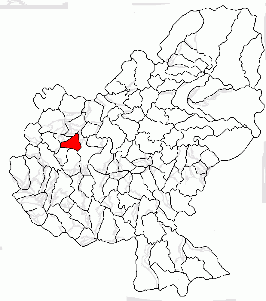 Categorie:Hărţi ale judeţului Mureş